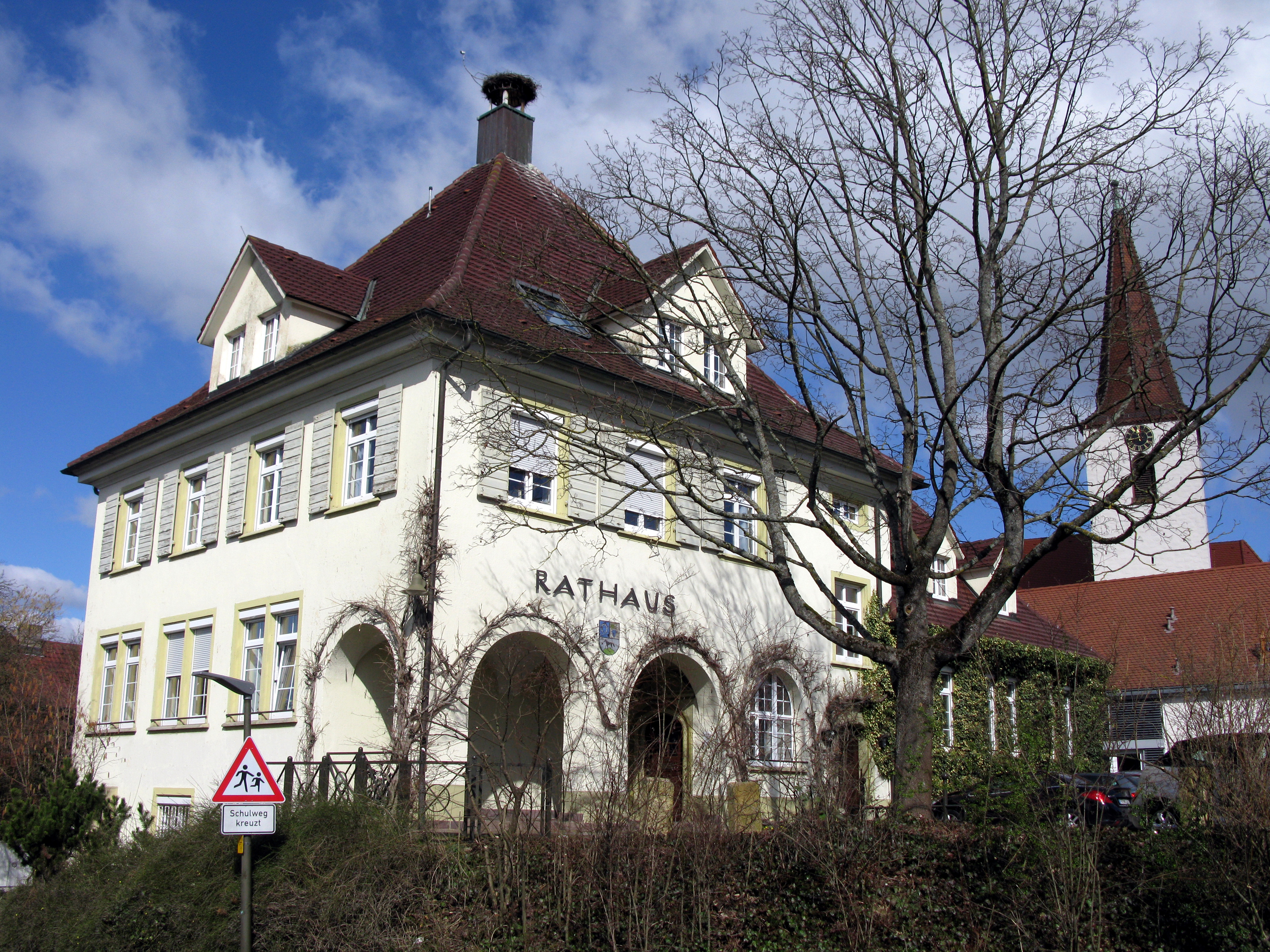 Rathaus von Schallstadt im Ortsteil Wolfenweiler mit Turm der Evangelischen Kirche